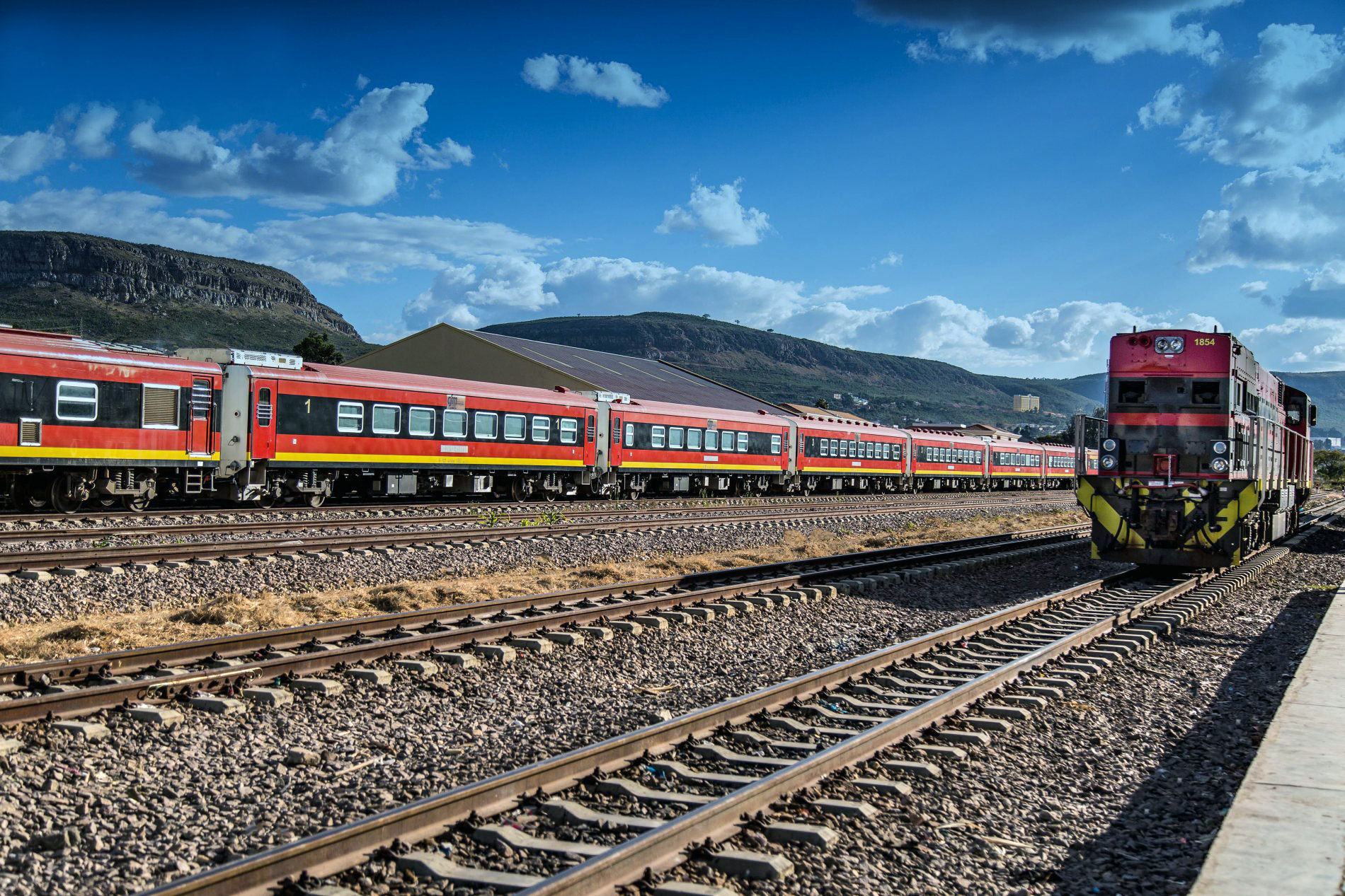 Pormenor da Estação Central do Lubango